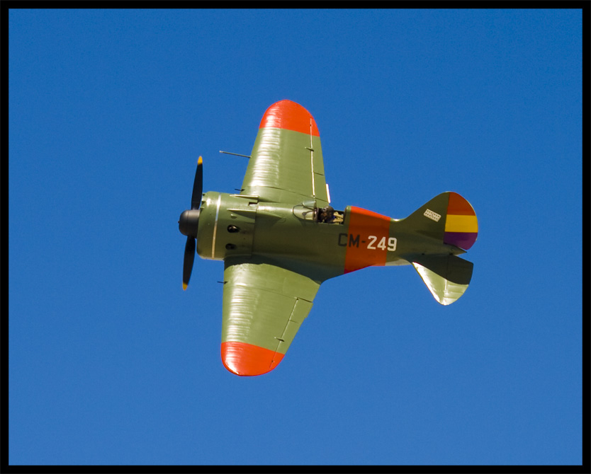 Polikarpov I-16 matriculado EC-JRK, con los embleas y colores del Ejército popular Repúblicano de España, preservado por la fundación Infante de Orleans Canon EOS 400D + Sigma 70-300 @ 86mm f/8 1/500s ISO 100